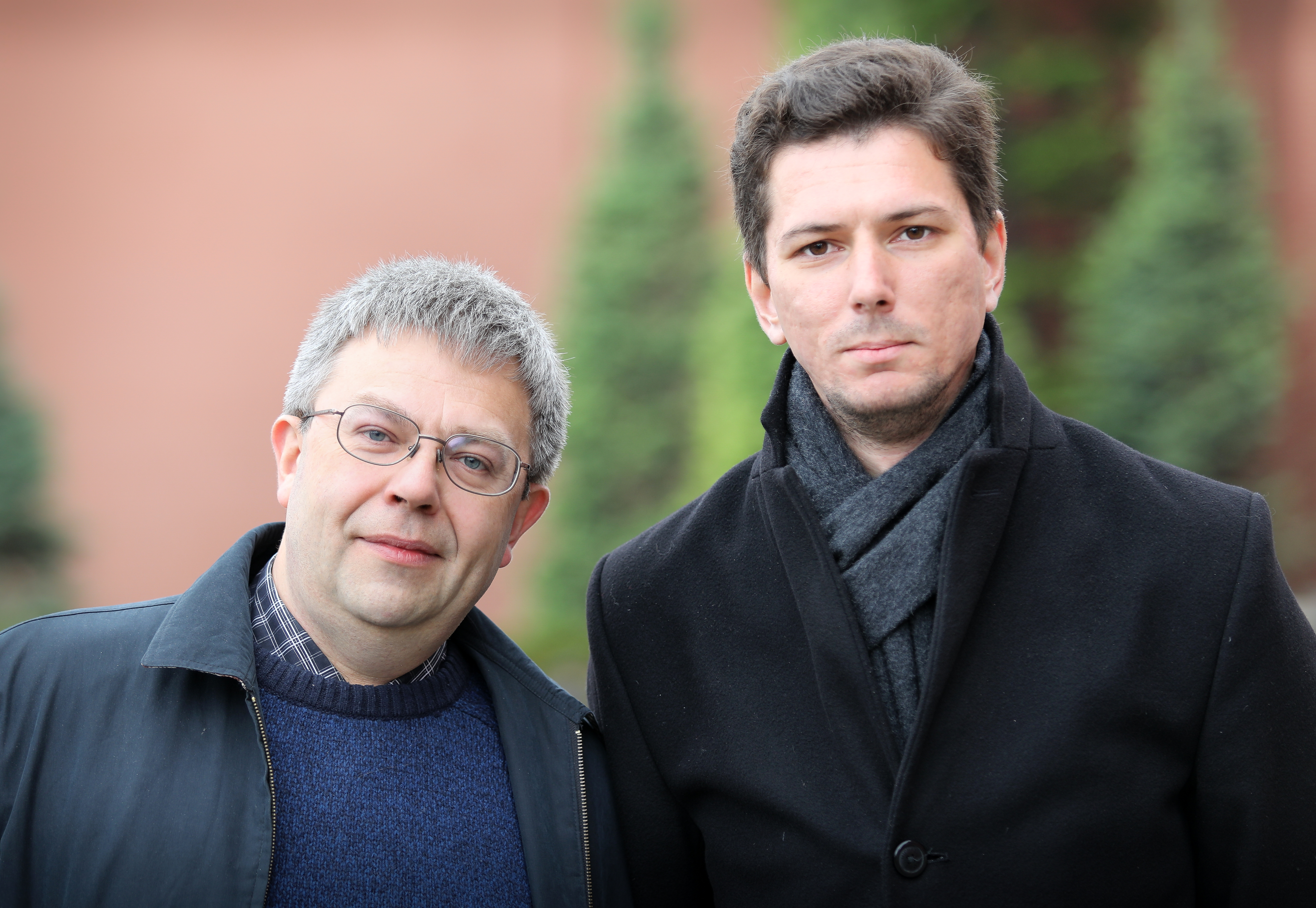 Максим Амелин (поэт) и Денис Безносов (поэт) на книжном фестивале "Красная площадь"-2017 в Москве.